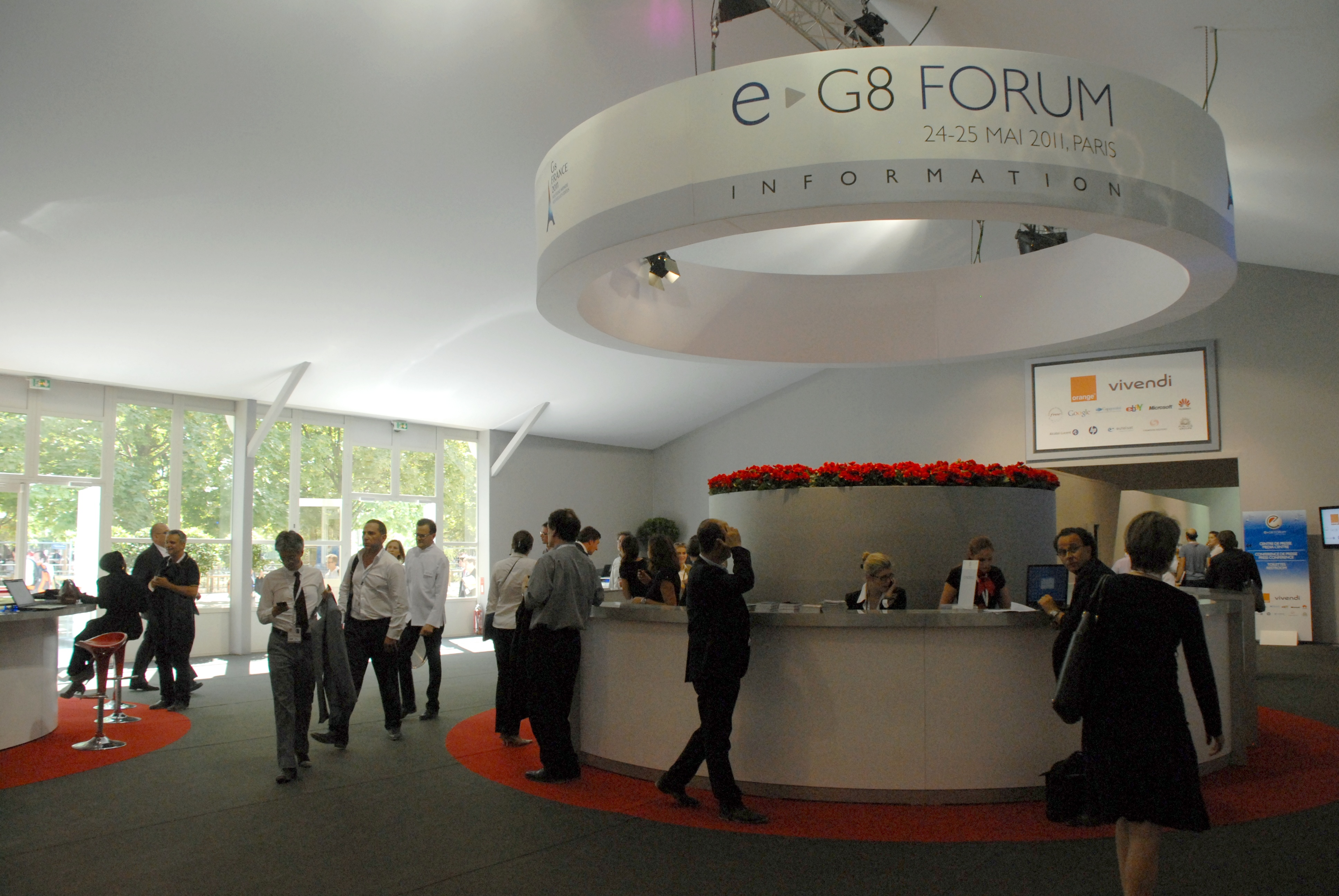 Escape d'accueil et d'information dans le chapiteau de l'e-G8